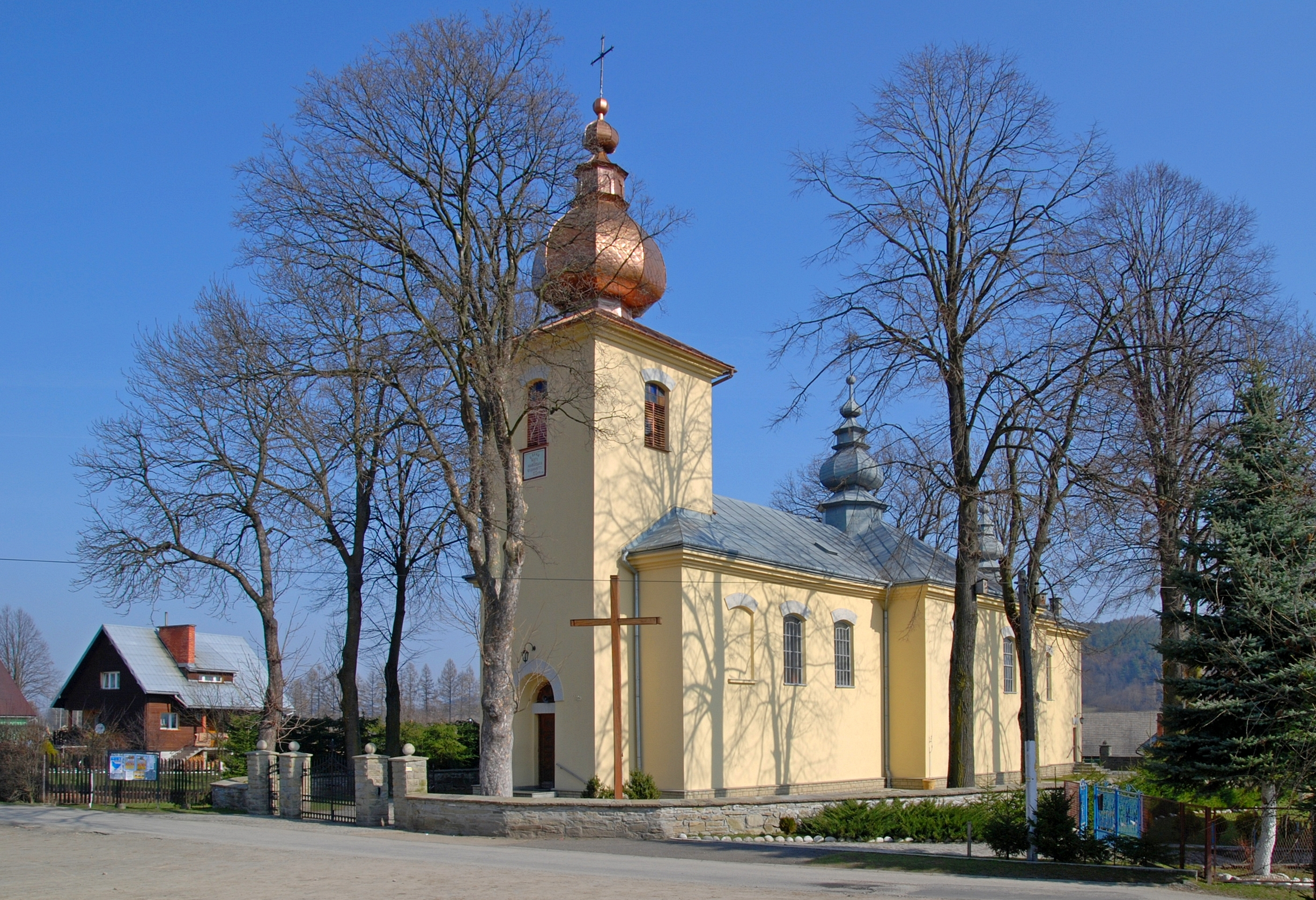 wieś Florynka